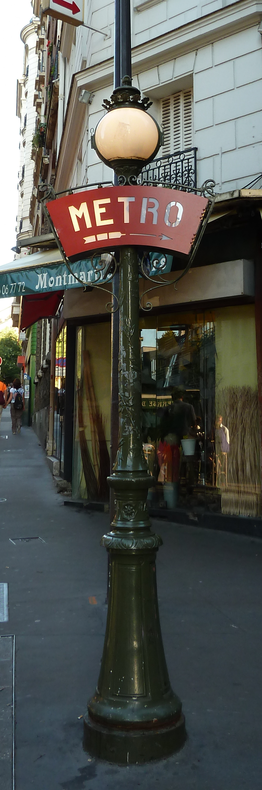 Candélabre devant l'entrée de la station Lamarck - Caulaincourt